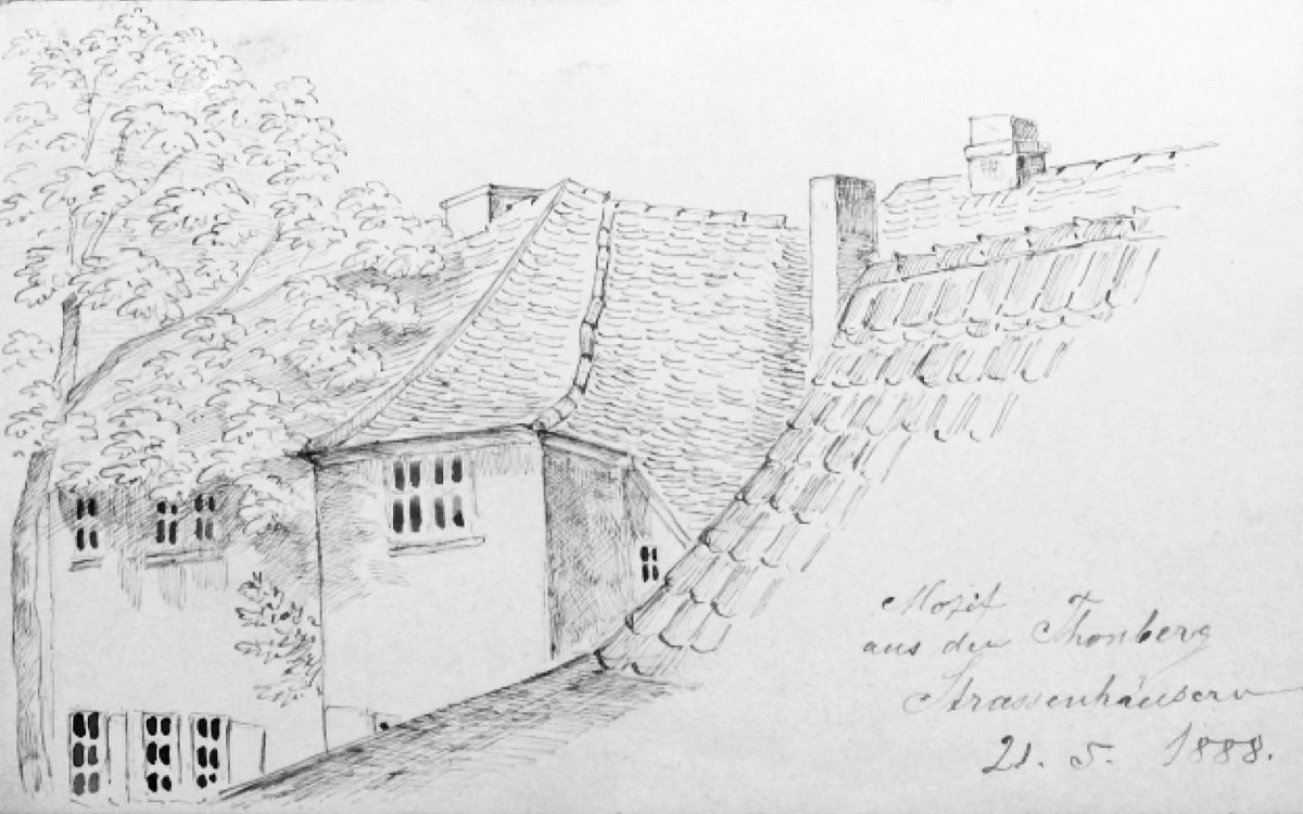 Motiv von den Thonberger Straßenhäusern